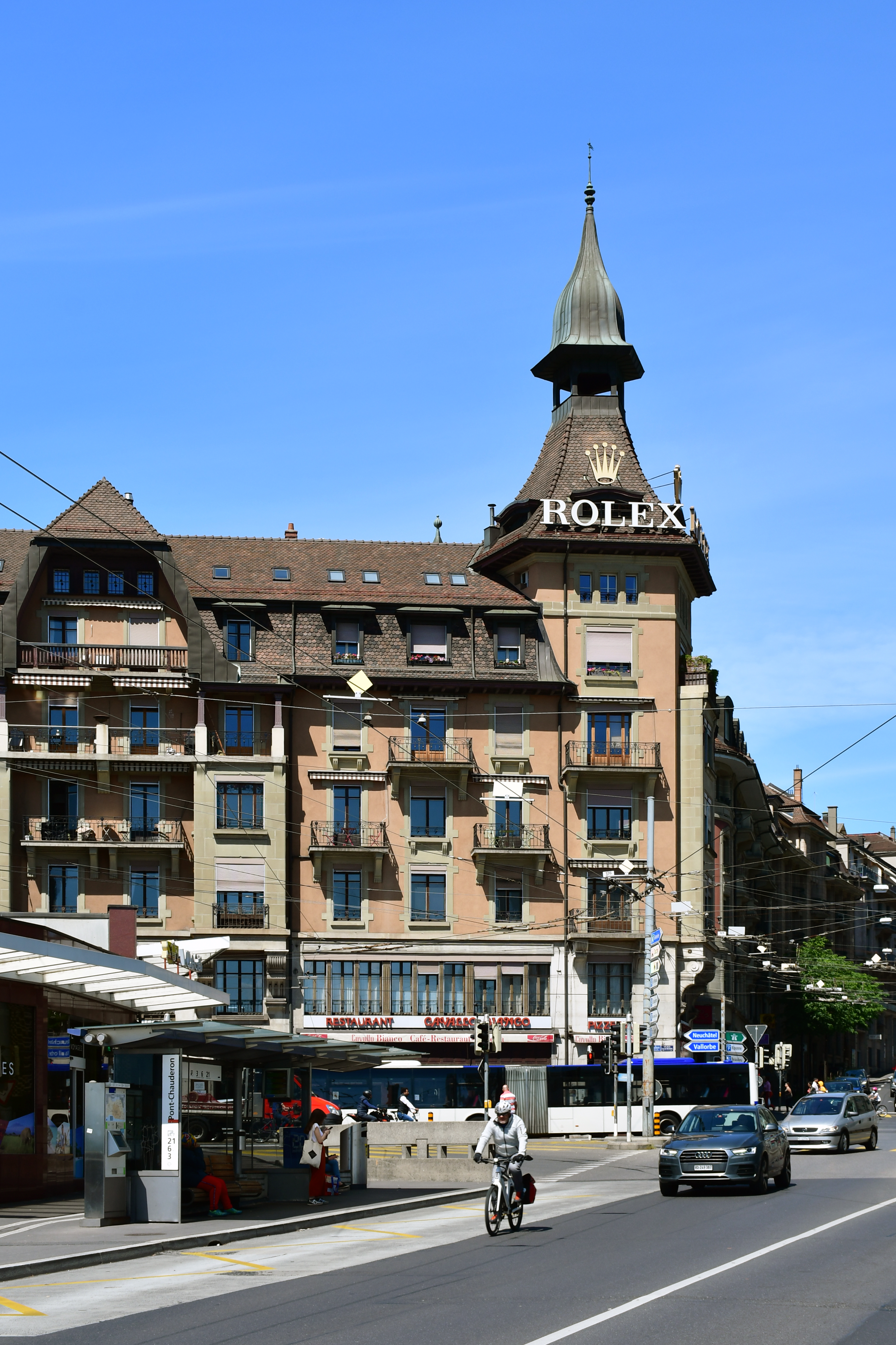 Le bâtiment Tourelle Chauderon, à l'ouest de la place Chauderon (n°24) de Lausanne (Suisse), construit en 1907.